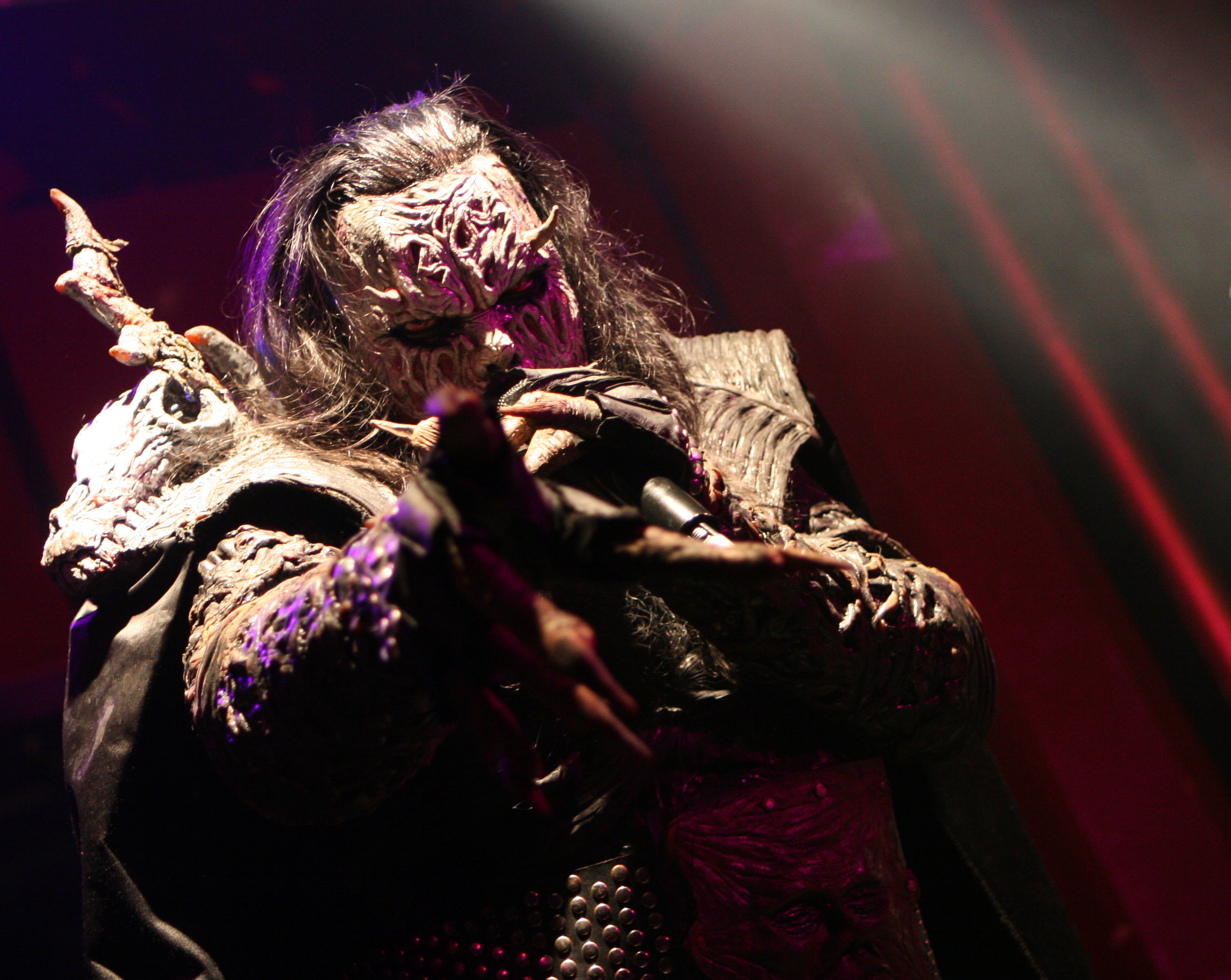 Lordi en la Sala Apolo de Barcelona el 20 de Febrero de 2009